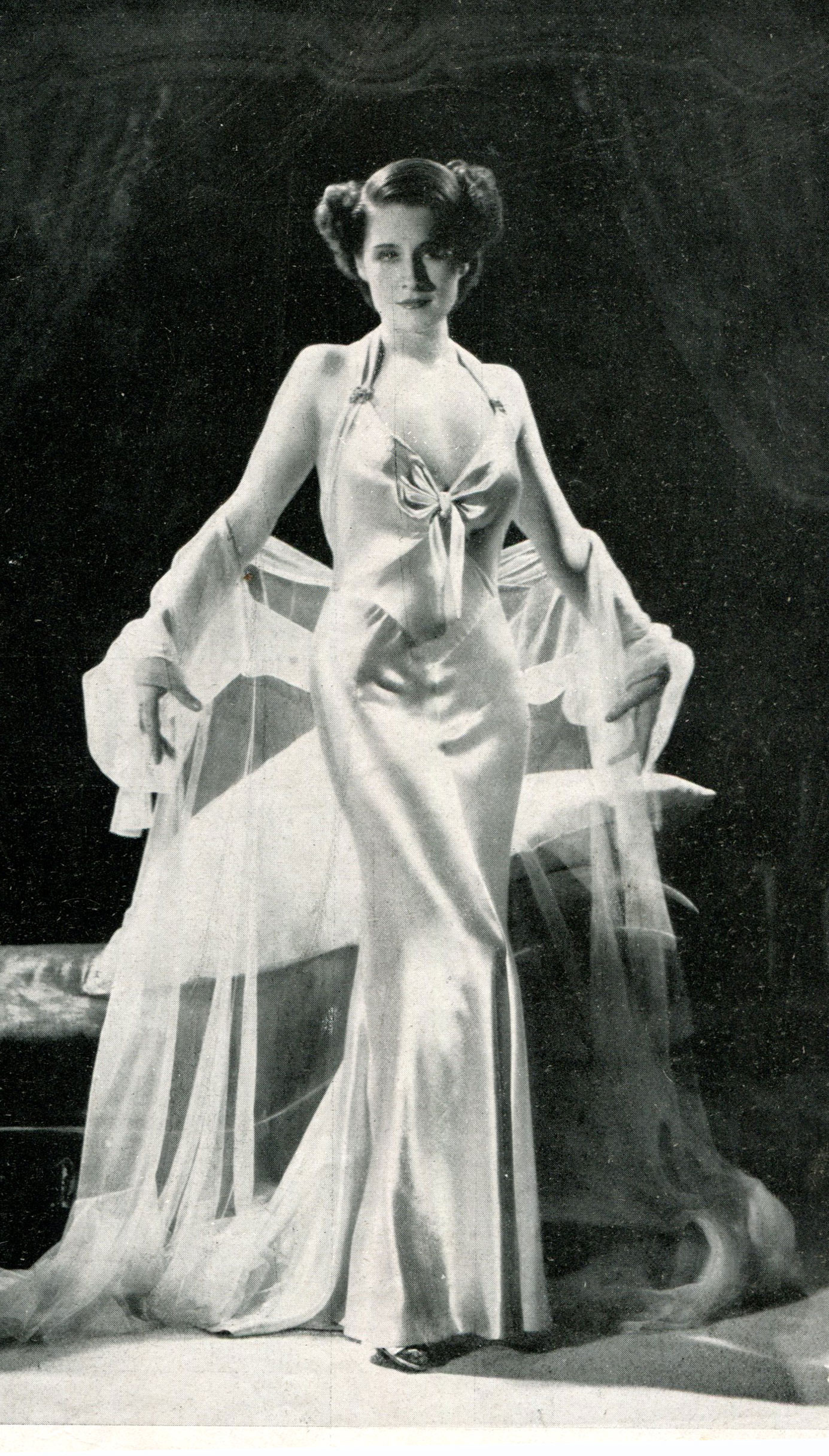 Norma Shearer in Riptide (1934) (Quando una donna ama) - Immagine pubblicata in Italia nel 1934.